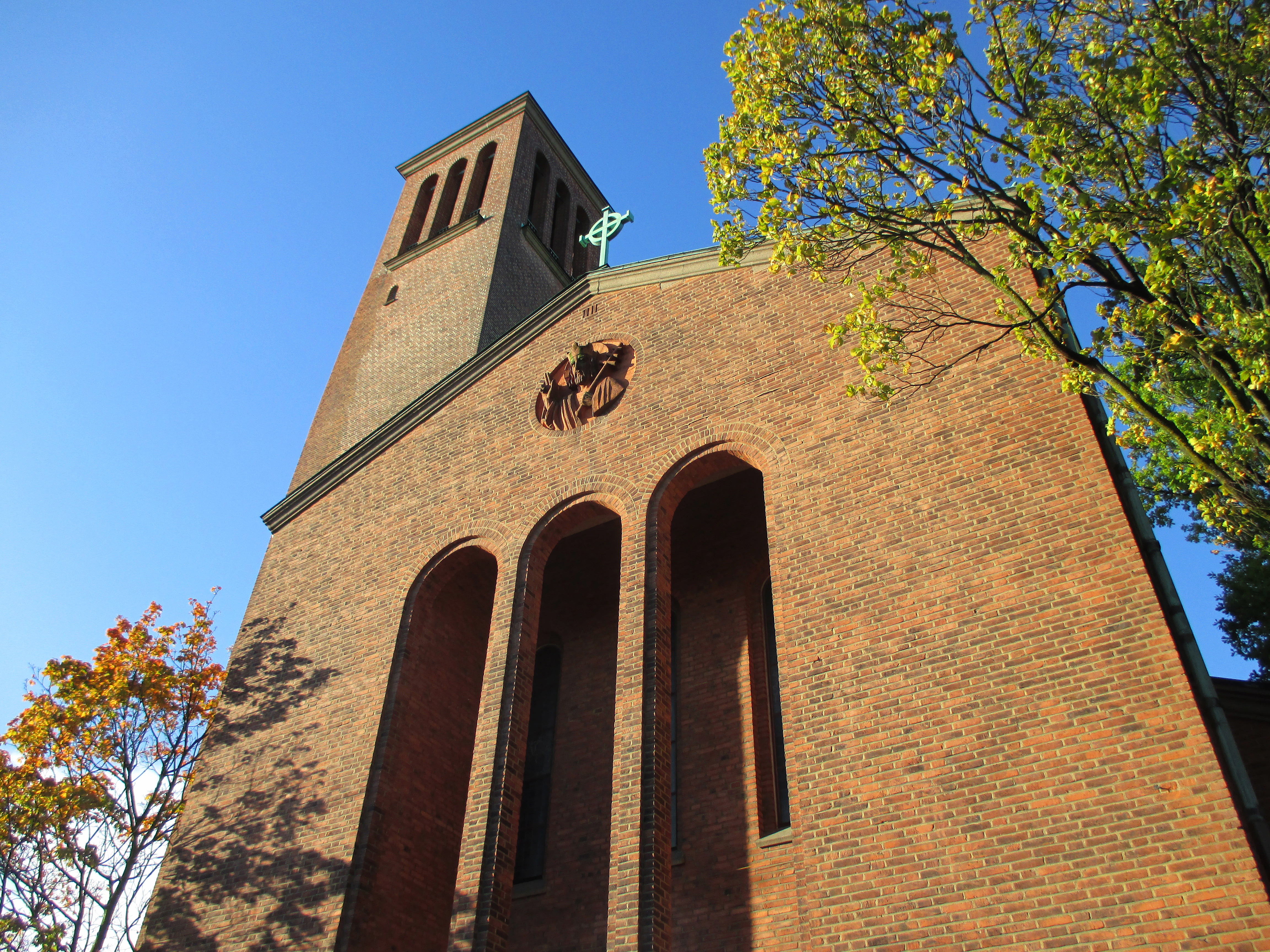 Kristus Konungens katolska kyrka på Parkgatan 16 i Göteborg, Göteborgs kommun, Västergötland, Västra Götalands län, Sverige. I folkmun kallas kyrkan för "Hedendomen" då den ligger vid Heden.